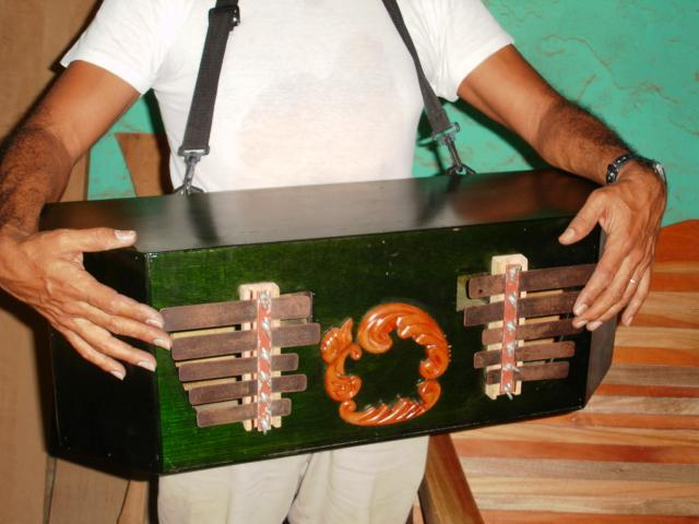 Marimbol de Carlos Vásquez - Minatitlán, Veracruz.